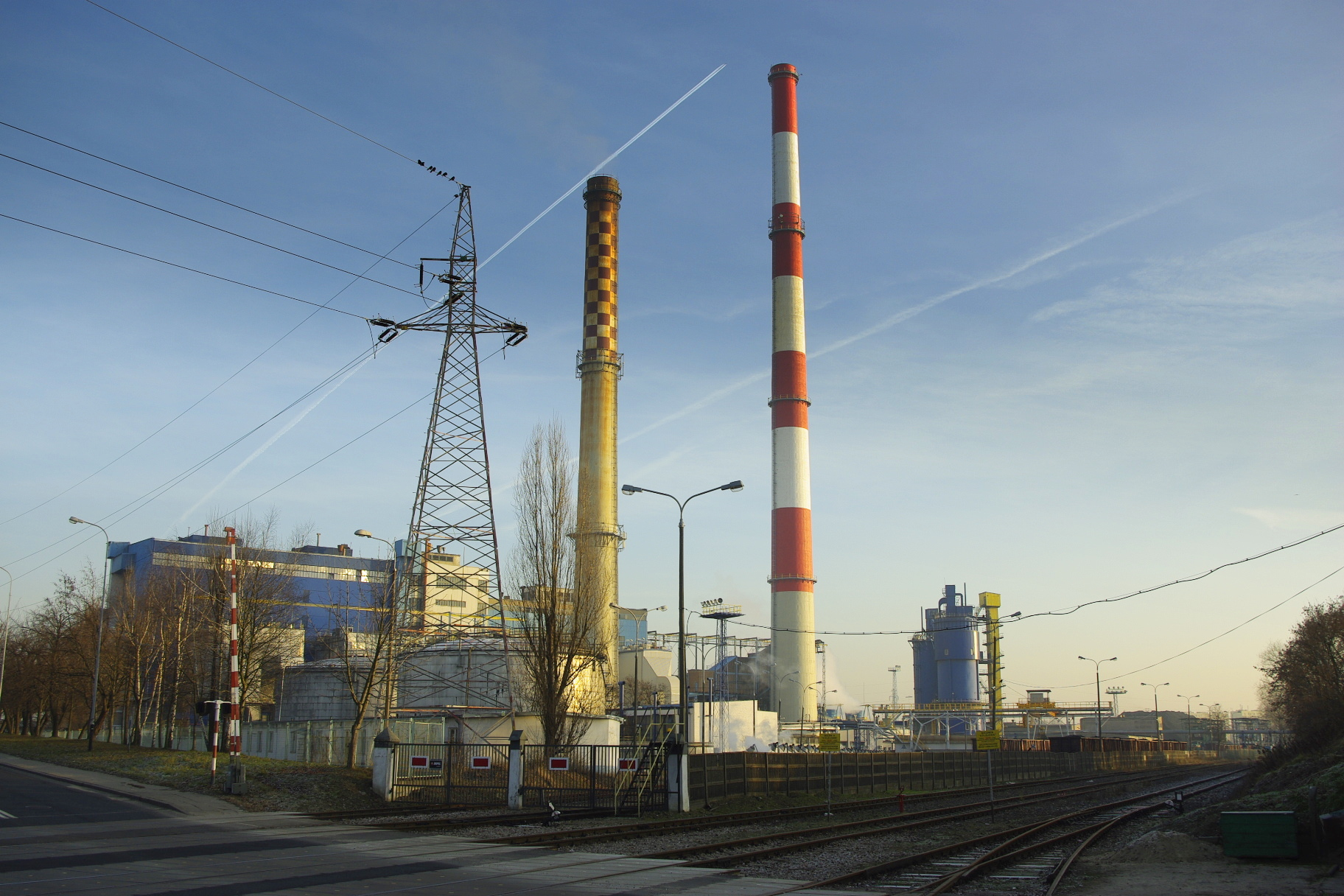 Elektro-ciepłownia 3 w Łodzi przy ul. Pojezierskiej